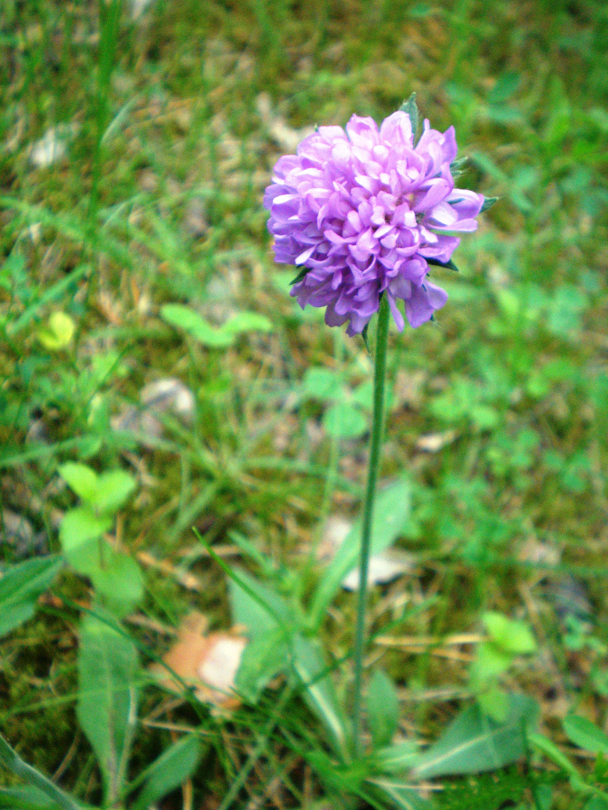 Knautia arvensis